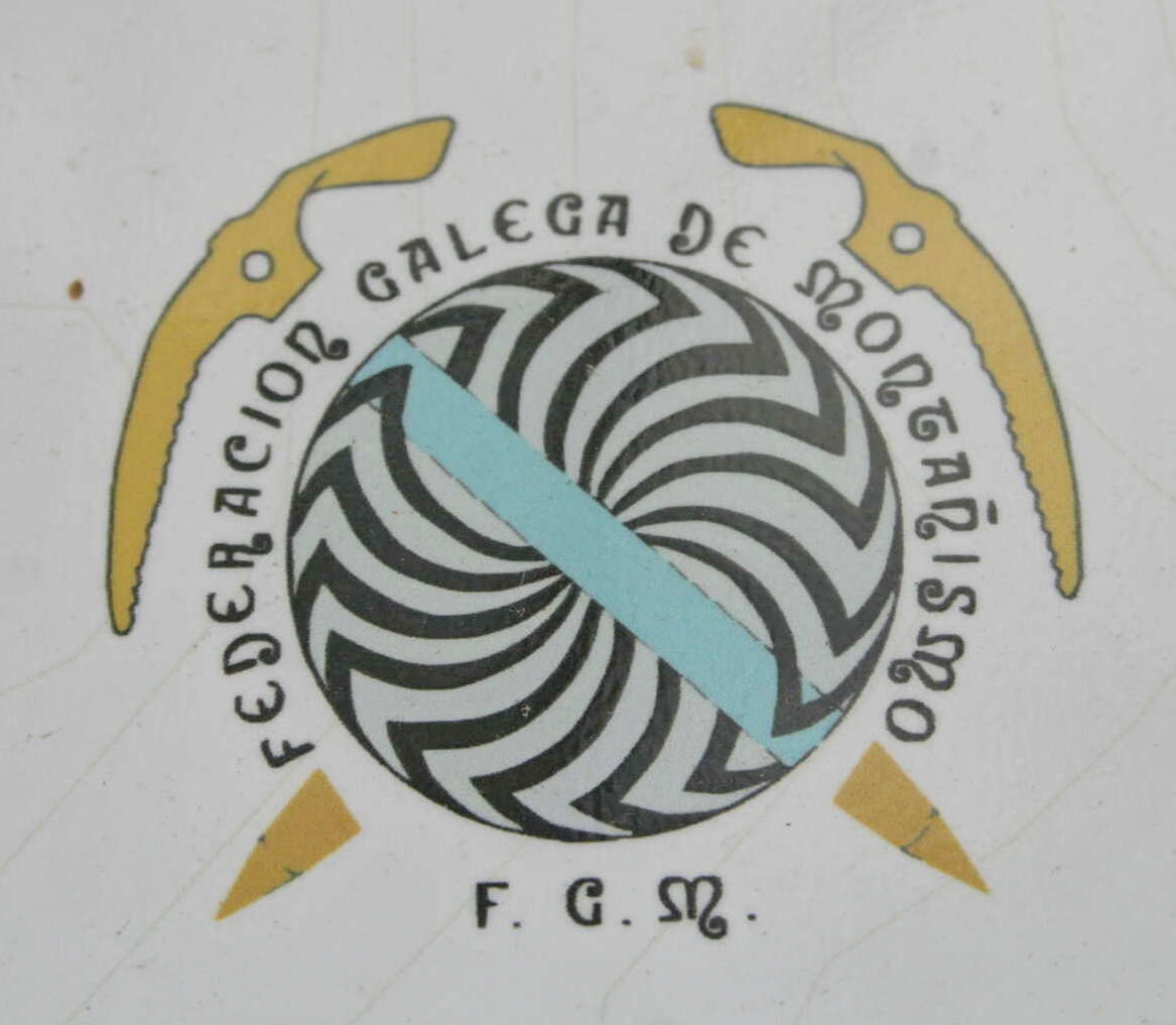 Logo de la Federación Gallega de Montañismo (España)